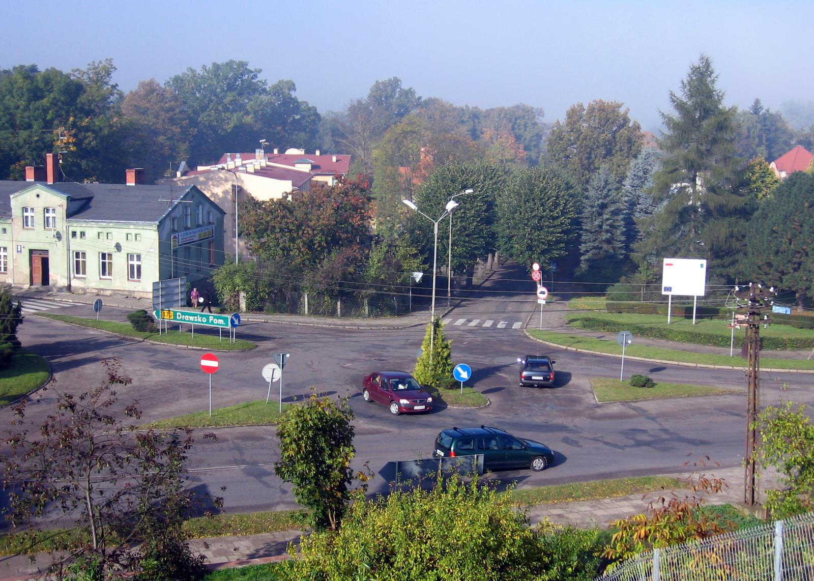 Skrzyżowanie drogi woj. nr 163 z nr 173 w Połczynie-Zdroju, woj. zachodniopomorskie